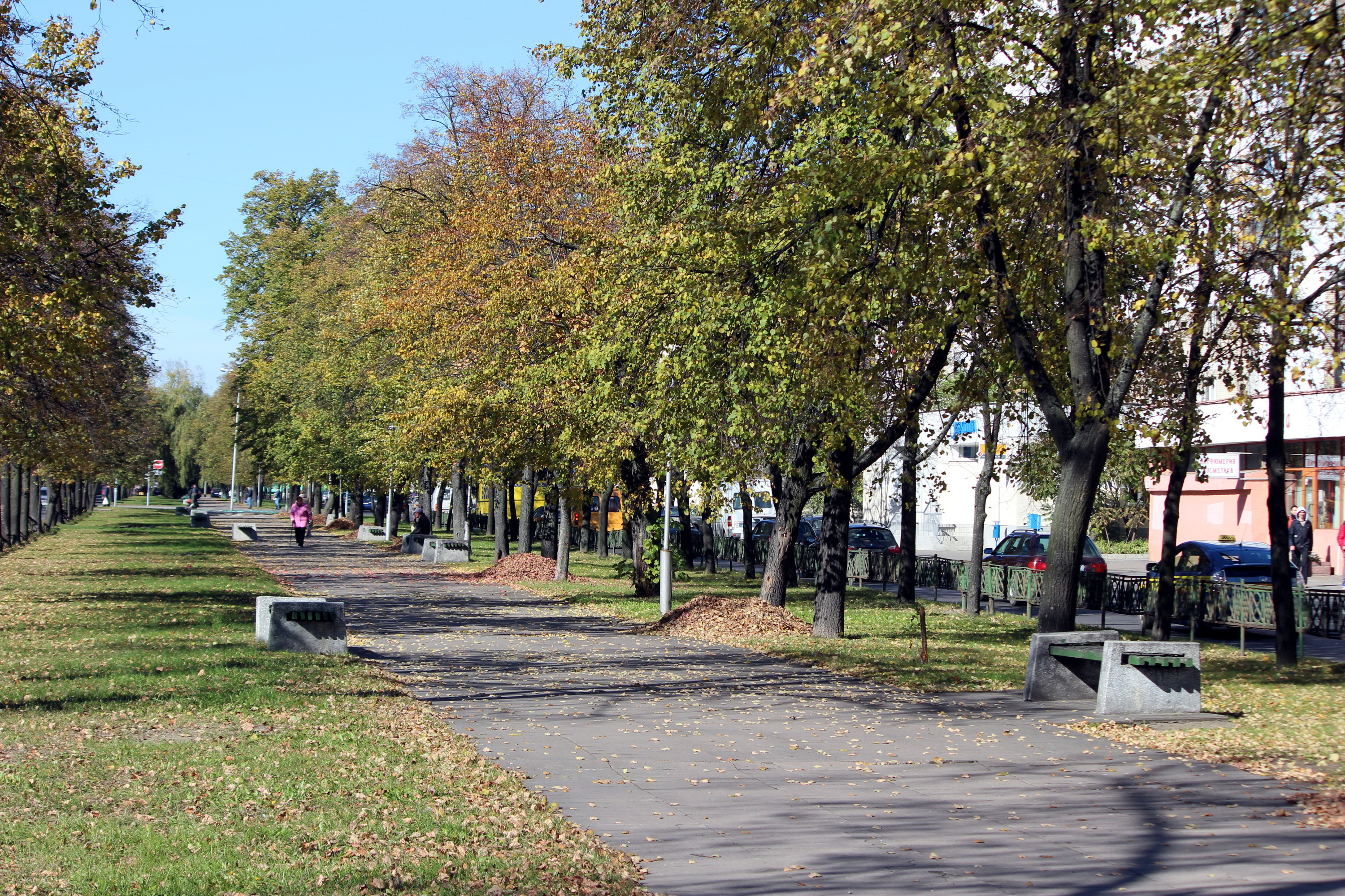 Восень у скверы